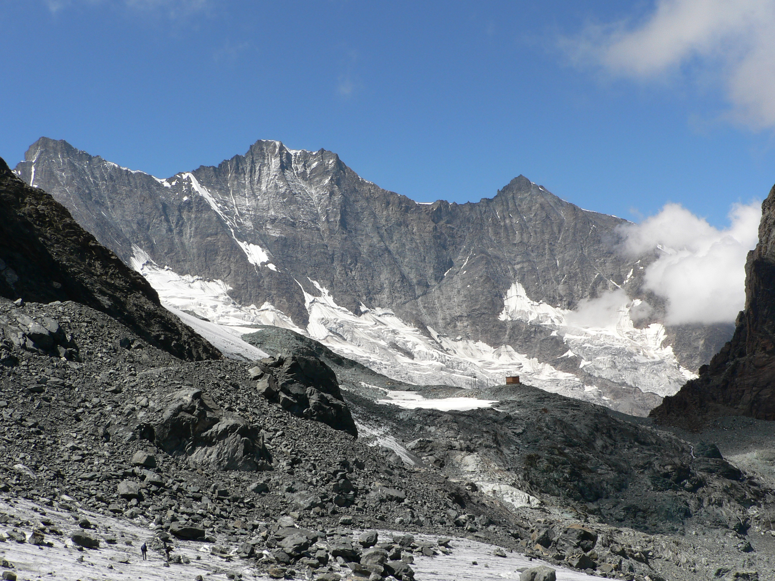 Täschhorn (4490m), Dom (4545m) and Lenzspitze (4294m) (from left), Swiss mountains